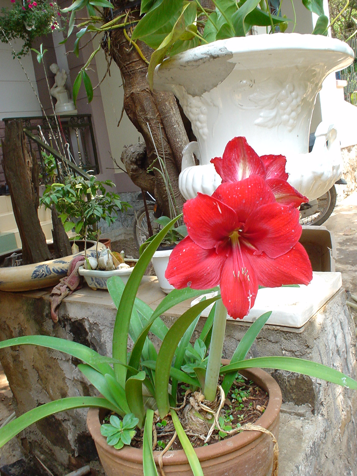 Lan Huệ đỏ hay còn gọi là Tứ diện xích lan (Hippeastrum equestre Herb. var. splendes Truff)